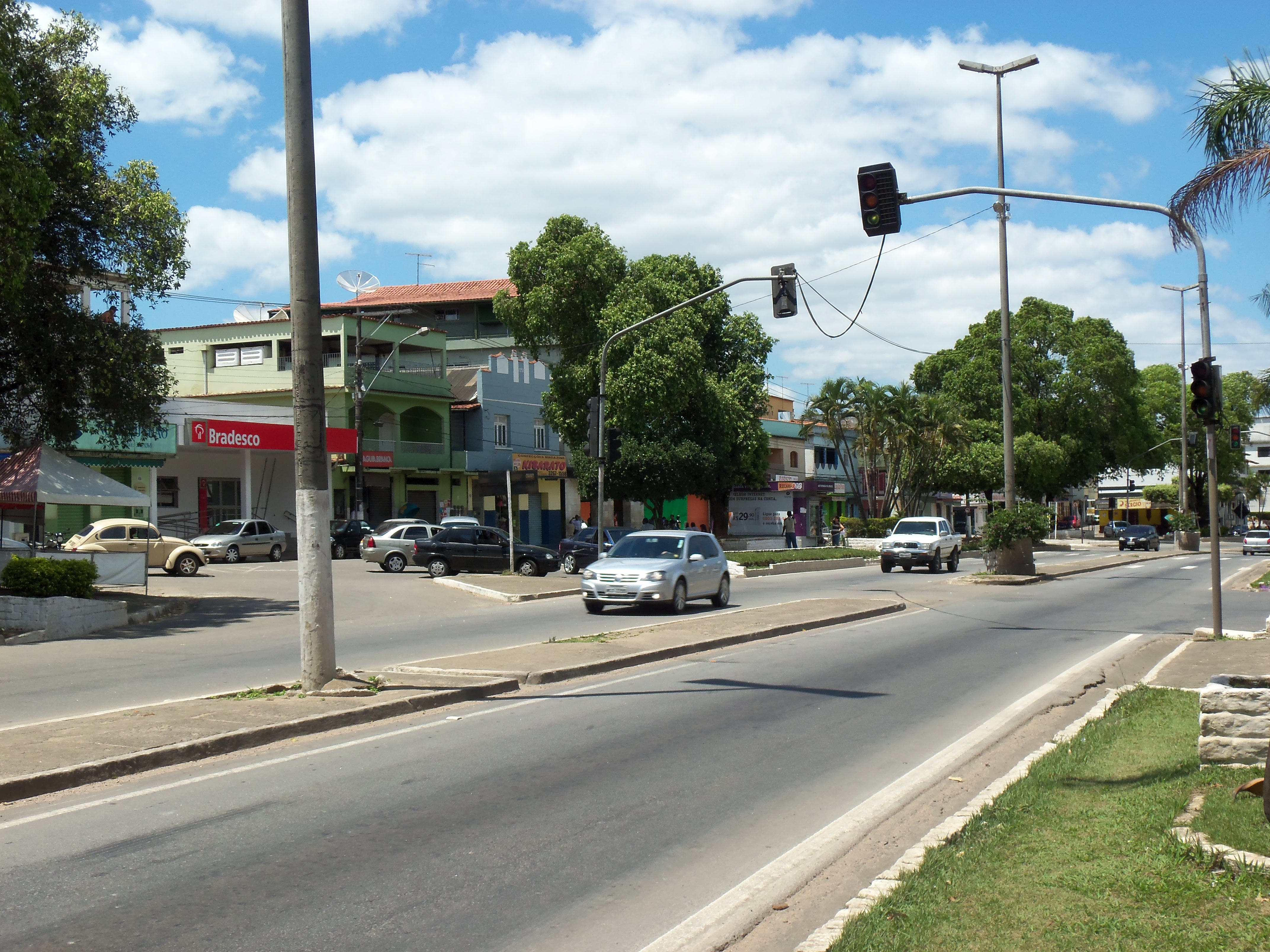 Rodovia BR-101 em Fundão, Espírito Santo.